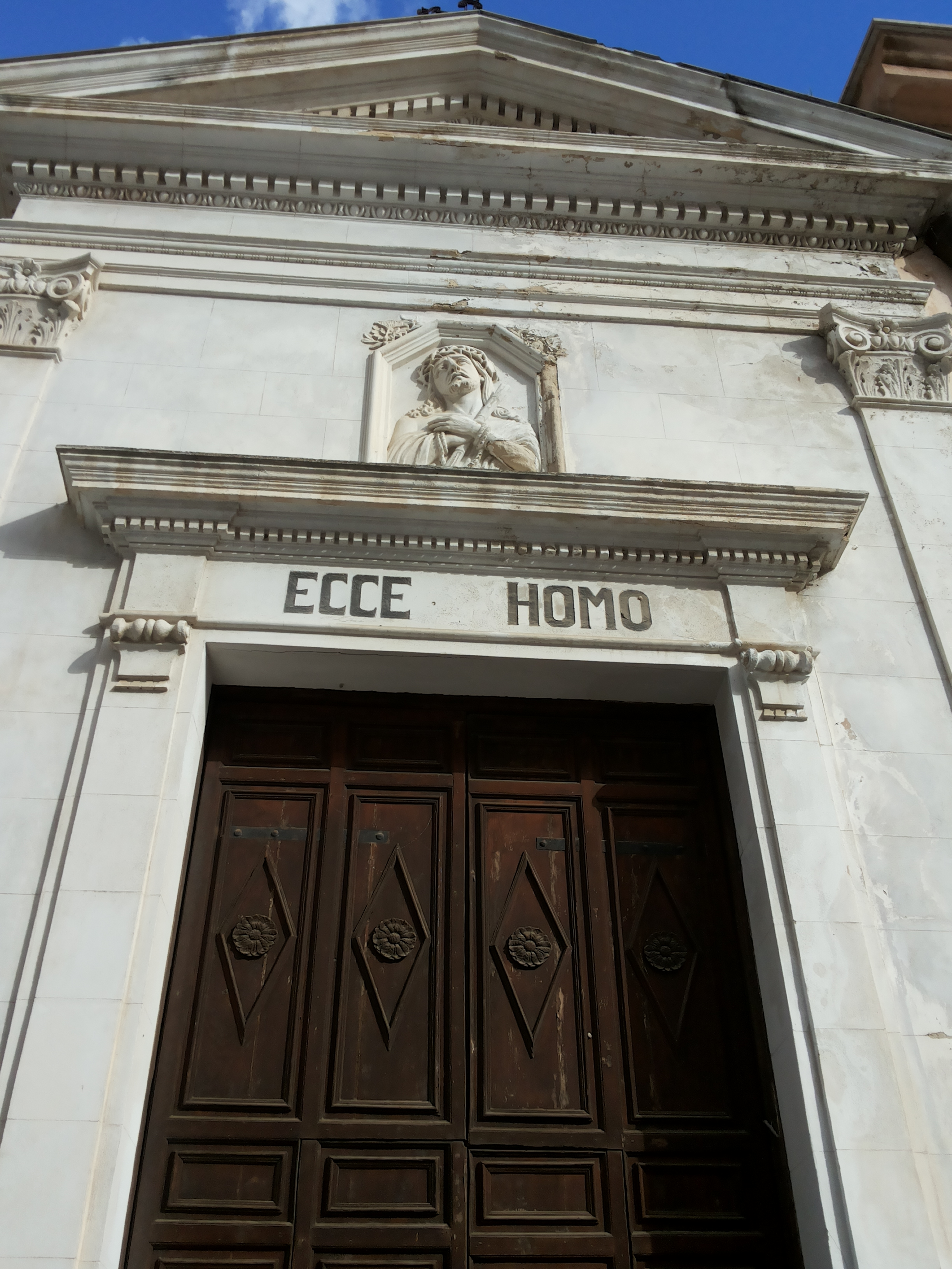 Chiesa dell'Ecce Homo ad Alcamo